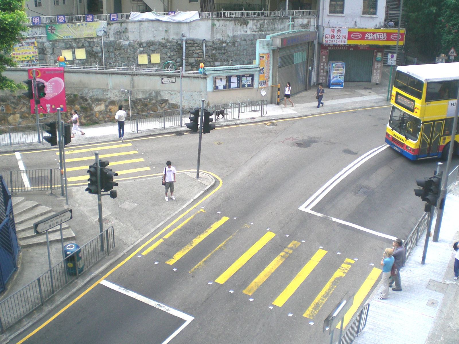 由水街望薄扶林道及高街. View from Water Street, Hong Kong